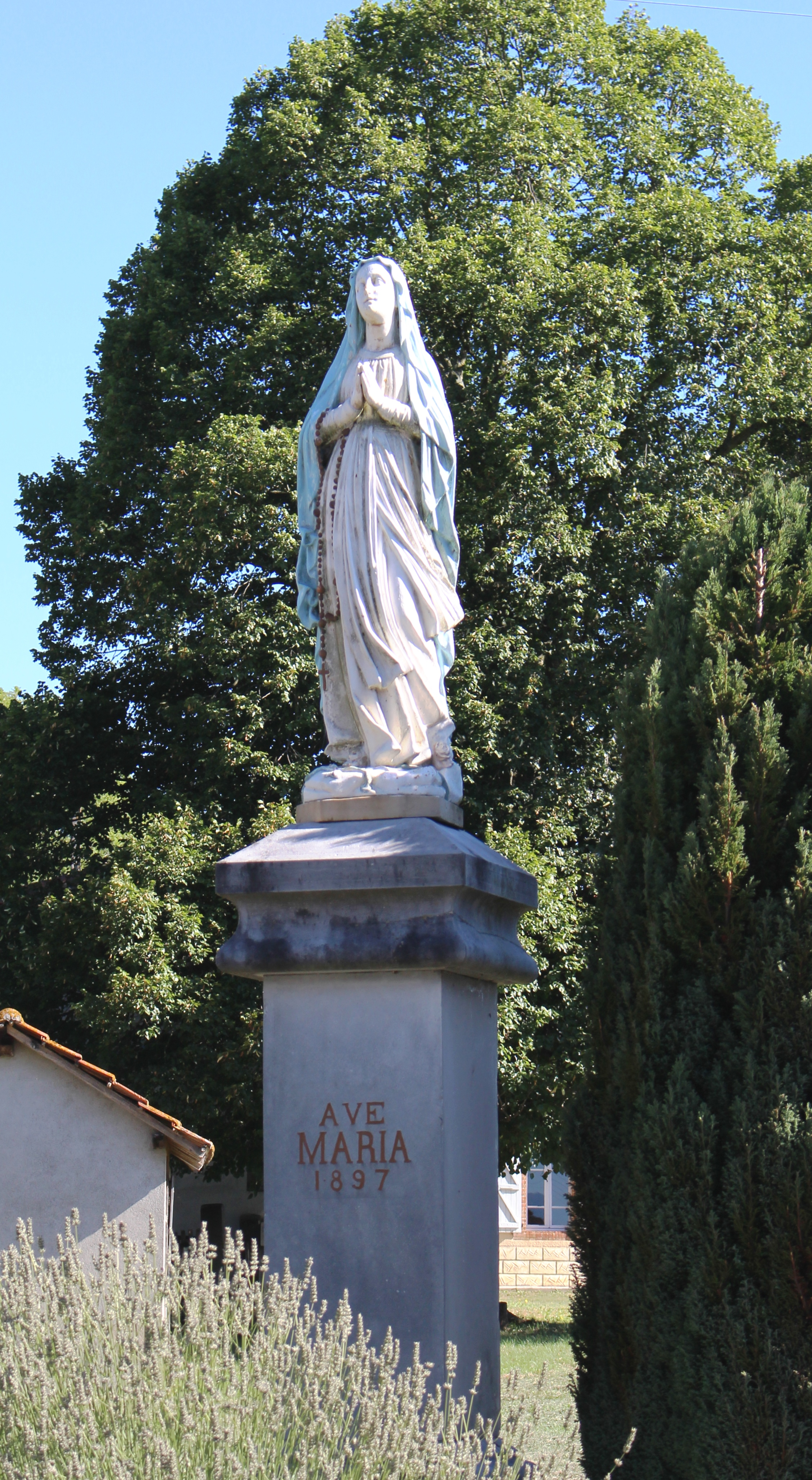 Vierge de Vieuzos (Hautes-Pyrénées)